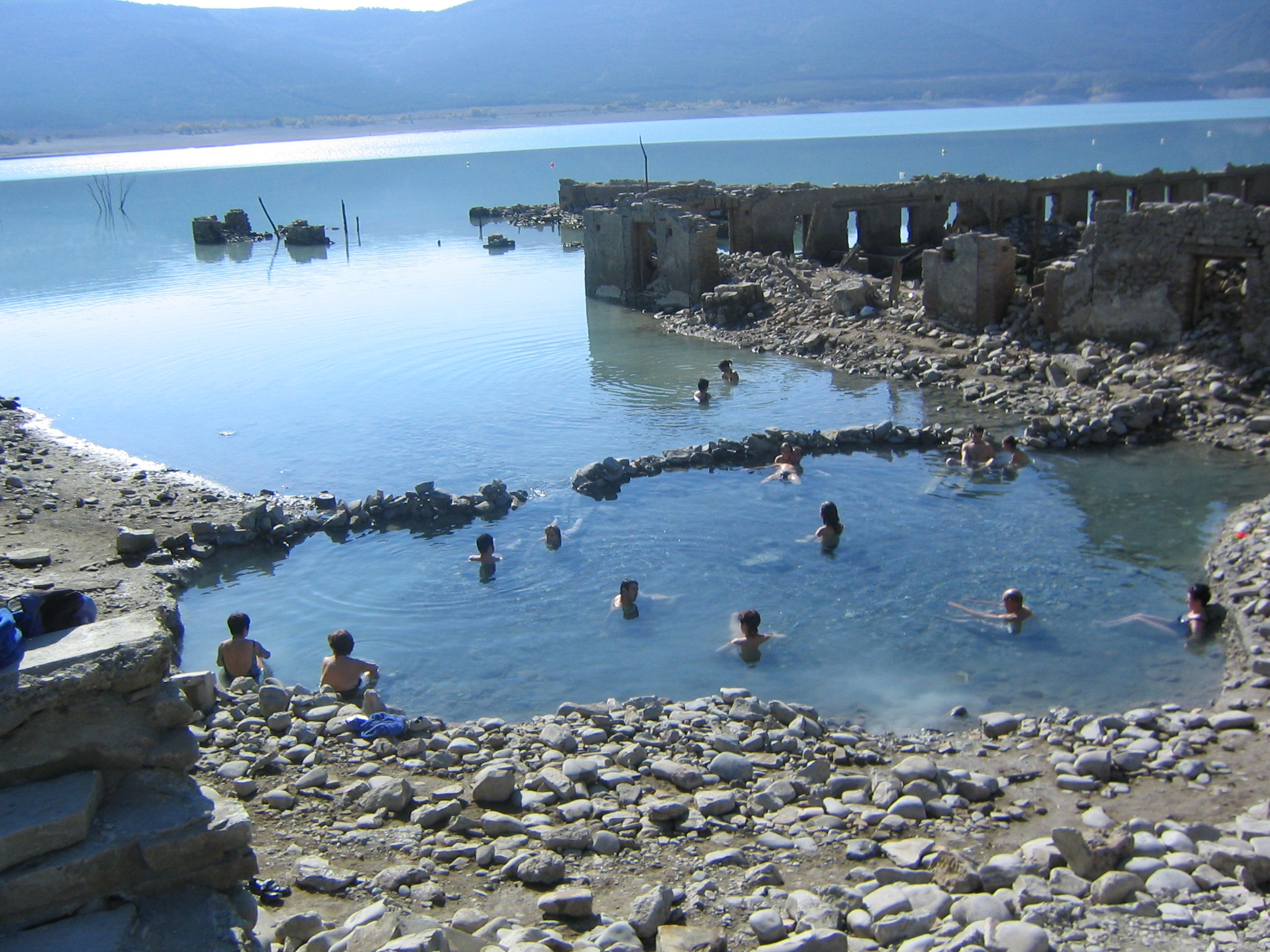 Restos del balneario de Tiermas, Zaragoza España. Hoy día se sigue utilizando el manantial cuando el embalse de Yesa esta bajo.